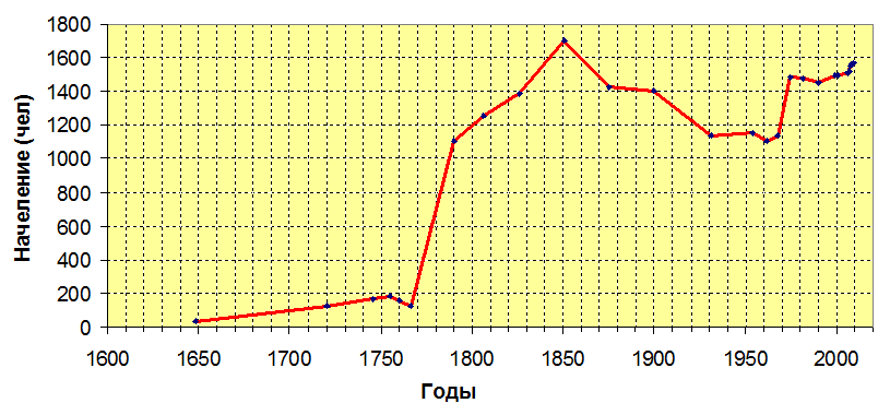 График численности населения коммуны Кенцхейм (Эльзас) по данным INSEE (большей частью приведены во Kintzheim, где взяты с [1] и других страниц ресурса, плюс более свежие жанные с [2]).